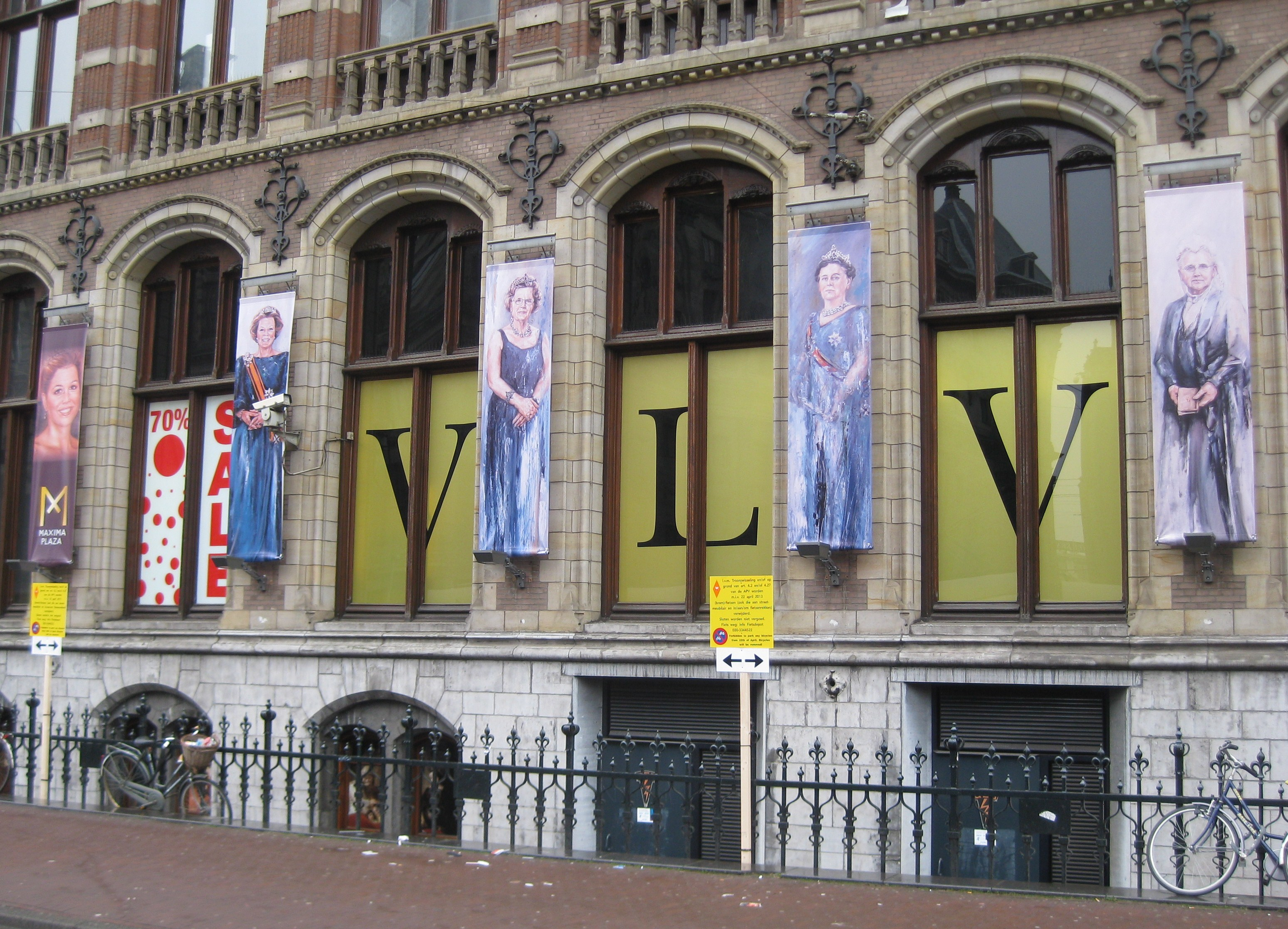 Versiering van de voorgevel van Magna Plaza in Amsterdam ter gelegenheid van de troonswisseling.